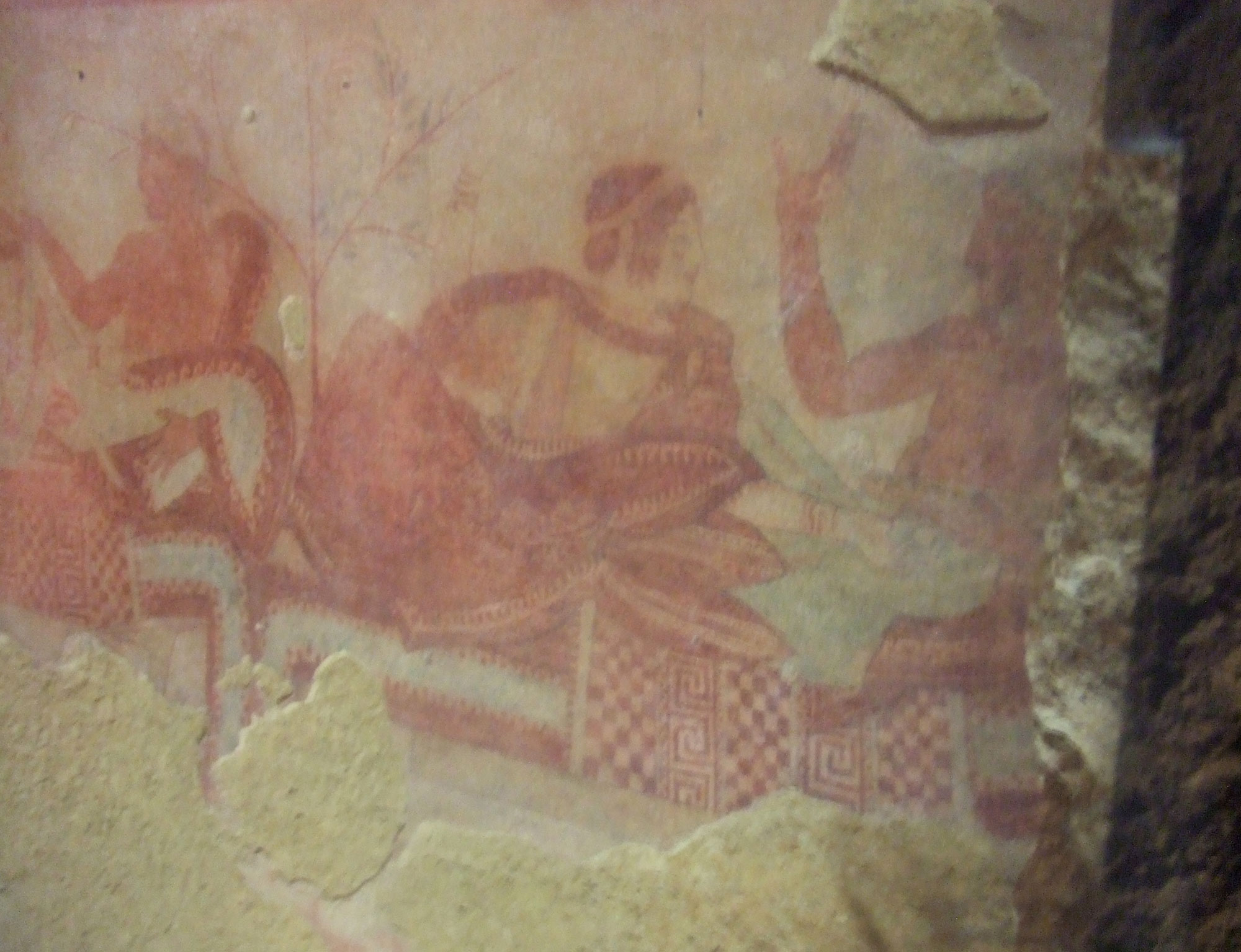 Fresque de la Tomba della Pulcella du site de Monterozzi